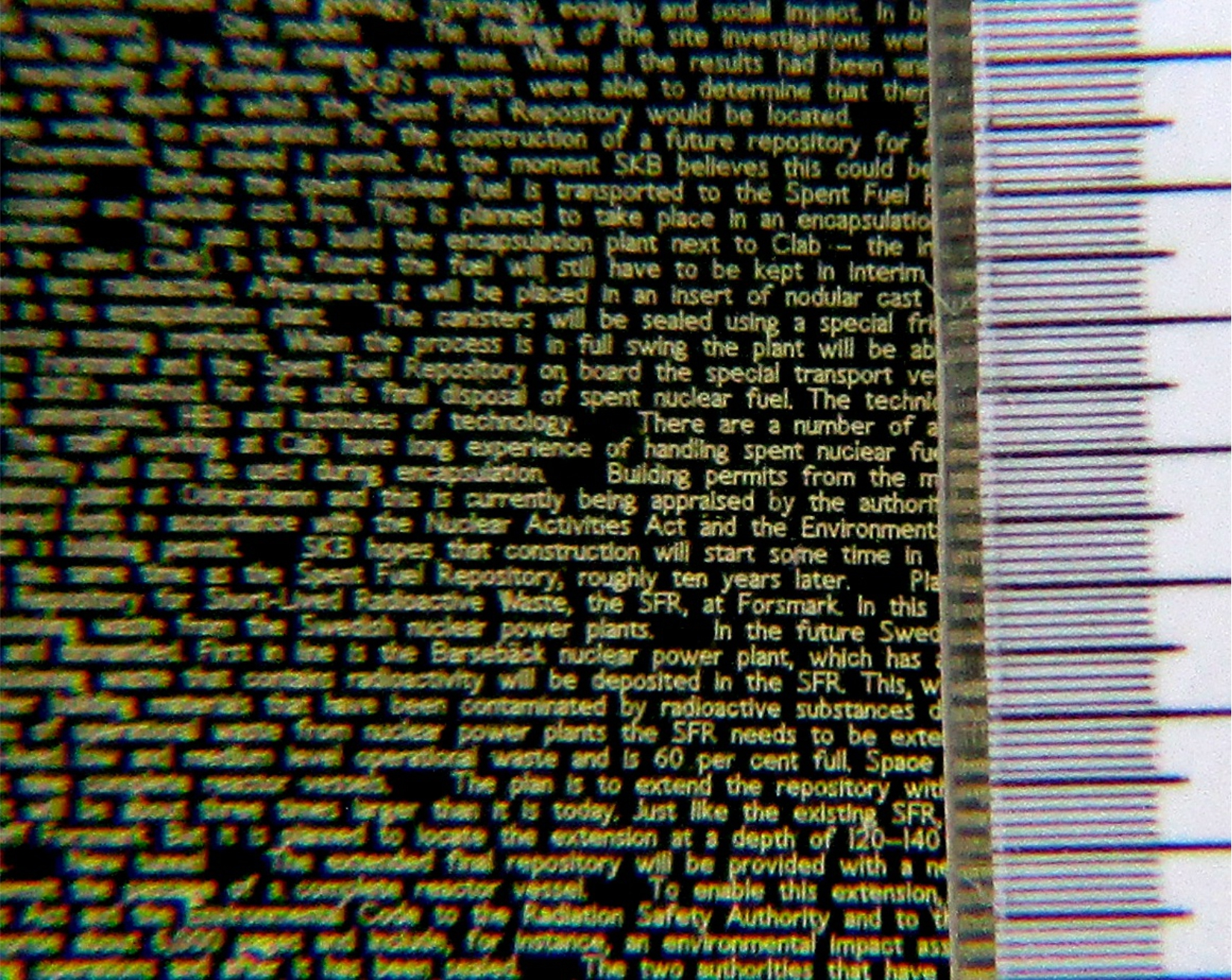 Mikrofilmtafel des Memory of Mankind Projektes.